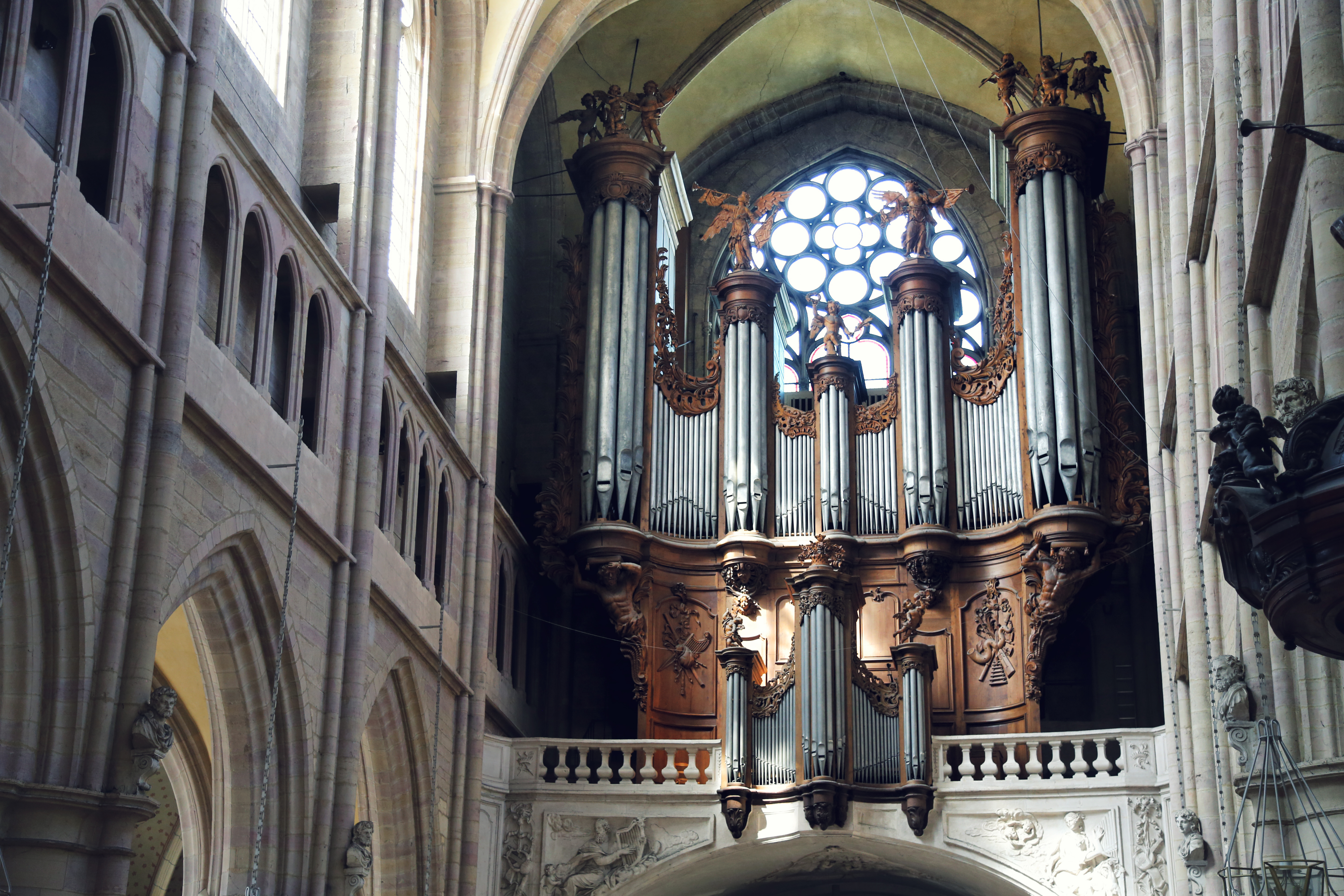 Orgel der Kathedrale Saint-Bénign in Dijon